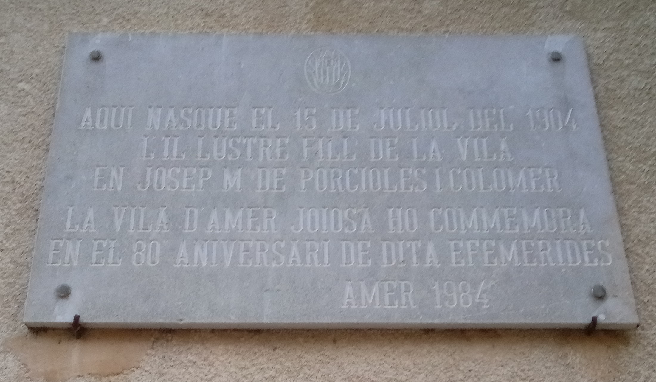 Placa commemorativa penjada a Amer el 16 d'agost de 1984, a la casa on va néixer Josep Mª de Porcioles i Colomer el 15 de juliol de 1904, amb motiu del seu 80 aniversari.